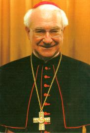 Bischof Schlembach